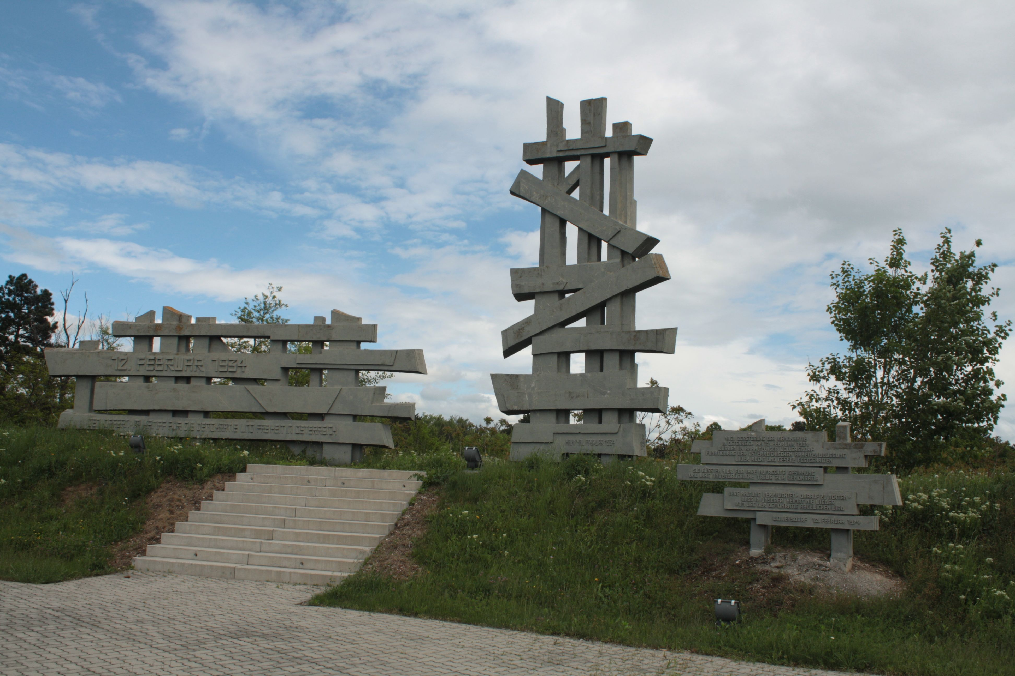 Mahnmal in Wöllersdorf-Steinabrückl in Niederösterreich